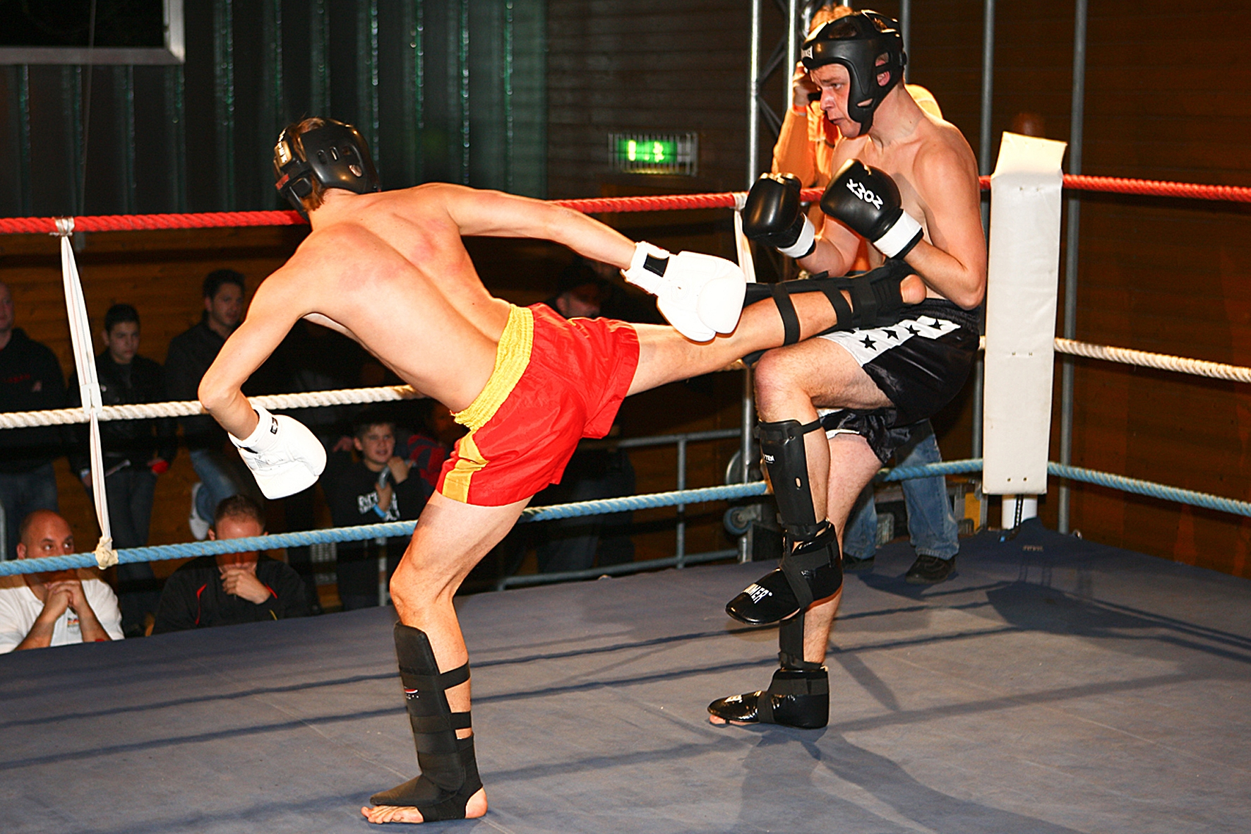 Das Bild zeigt einen Side-Kick im Kickboxen Wettkampf